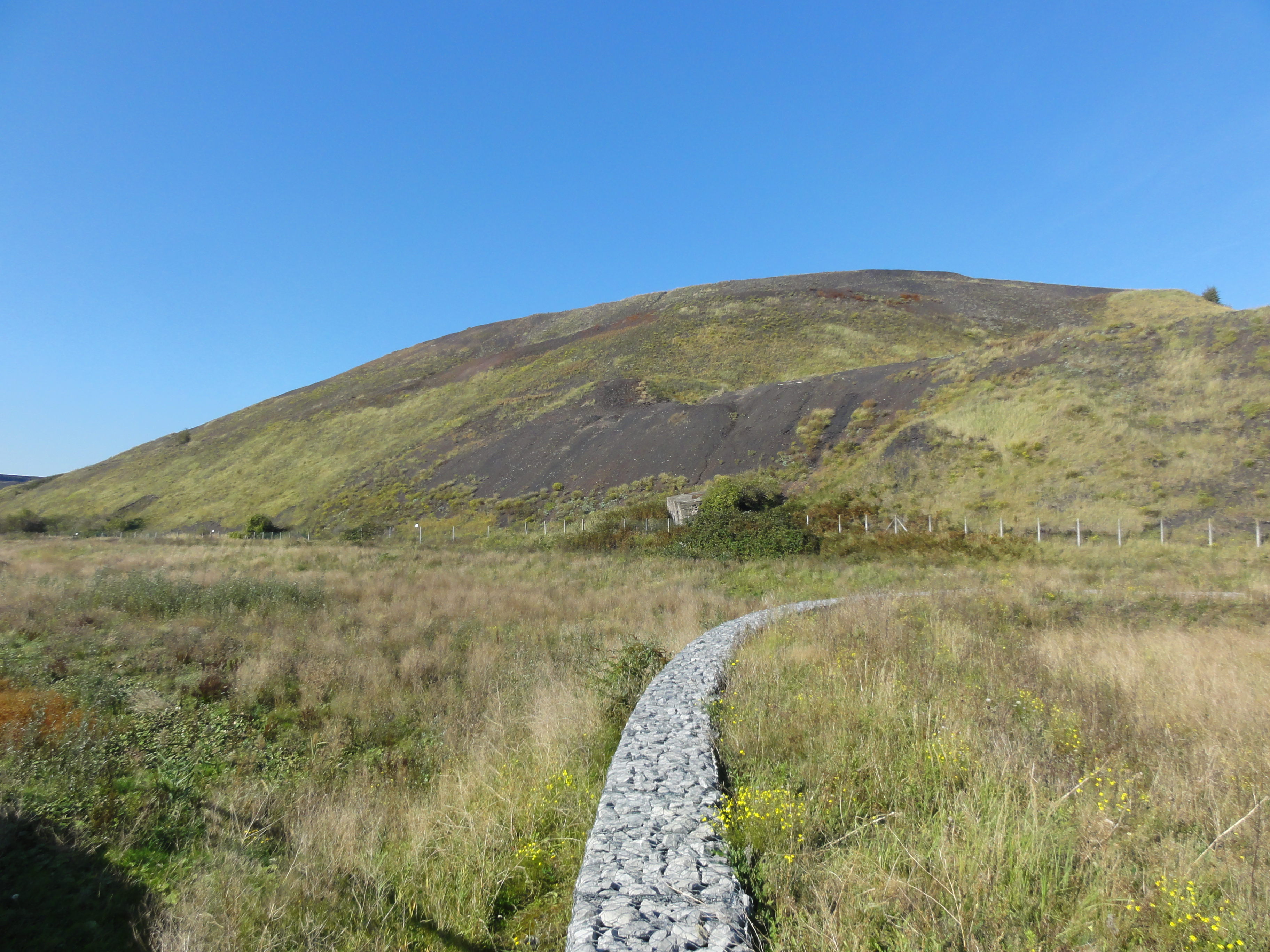 Terril n° 205 dit 1 de Drocourt, fosse n° 1 de la Compagnie des mines de Drocourt dans le bassin minier du Nord-Pas-de-Calais, Hénin-Beaumont, Pas-de-Calais, Nord-Pas-de-Calais, France. Le terril no 205 est inscrit sur la liste du patrimoine mondial de l'Unesco le 30 juin 2012 et y constitue en partie le site no 48.